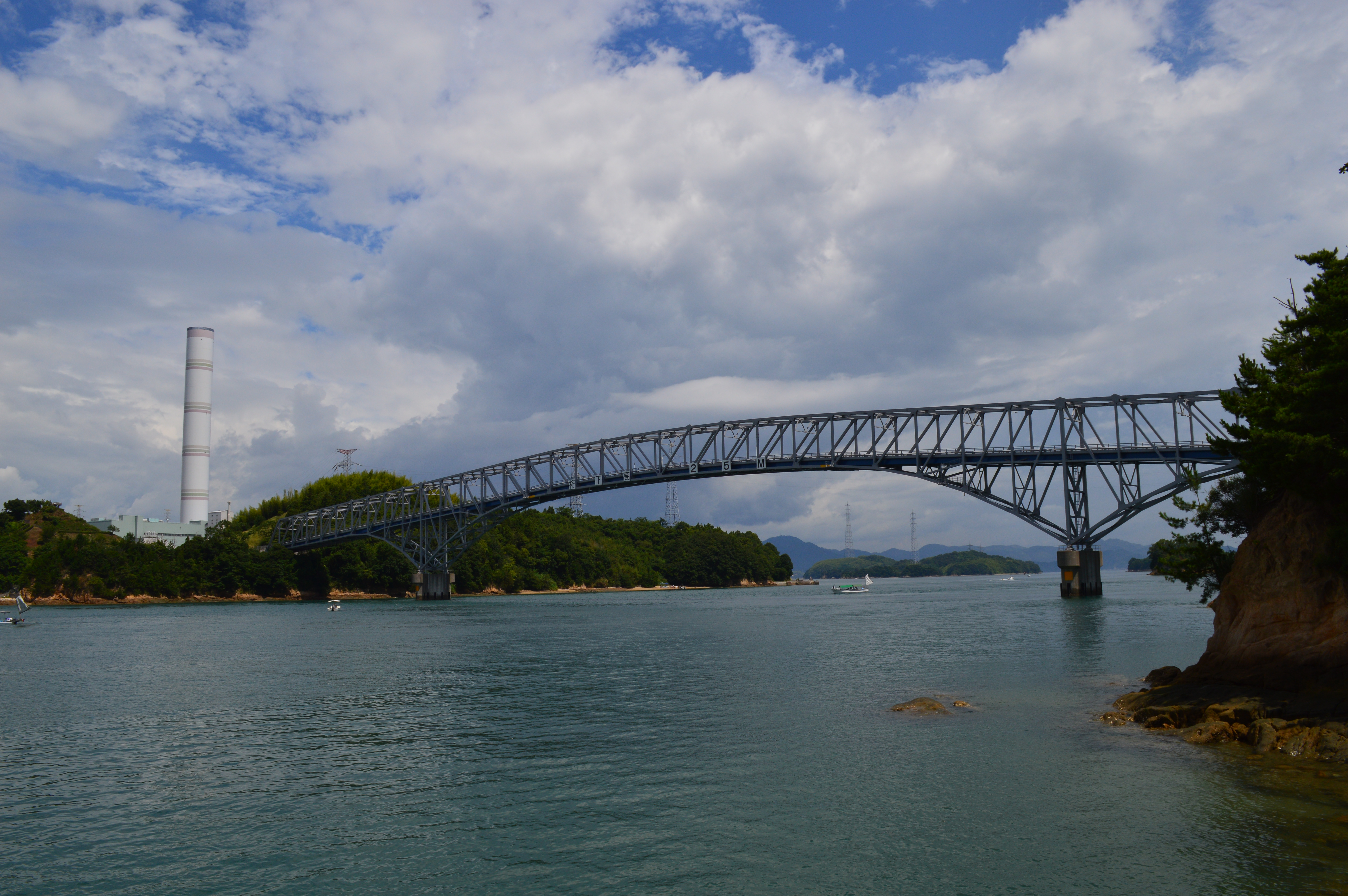 広島県の大崎上島にある長島大橋